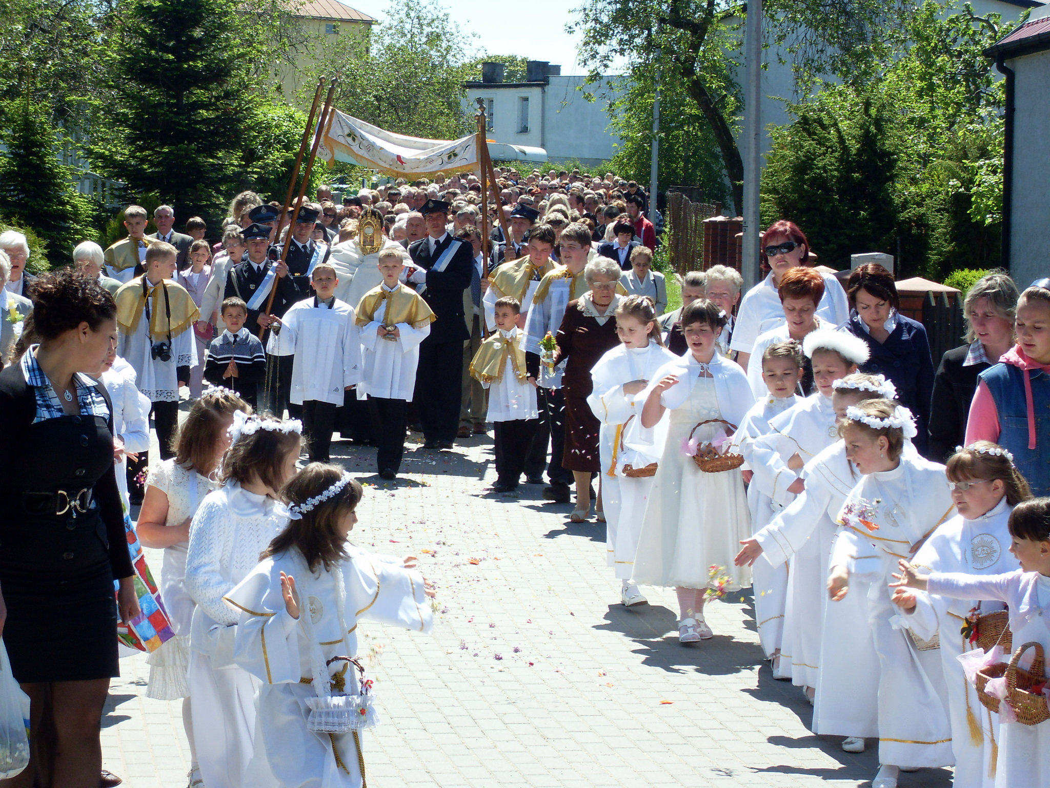 Uroczystość Najświętszego Ciała i Krwi Pańskiej (Boże Ciało) w Dygowie w 2010 roku.